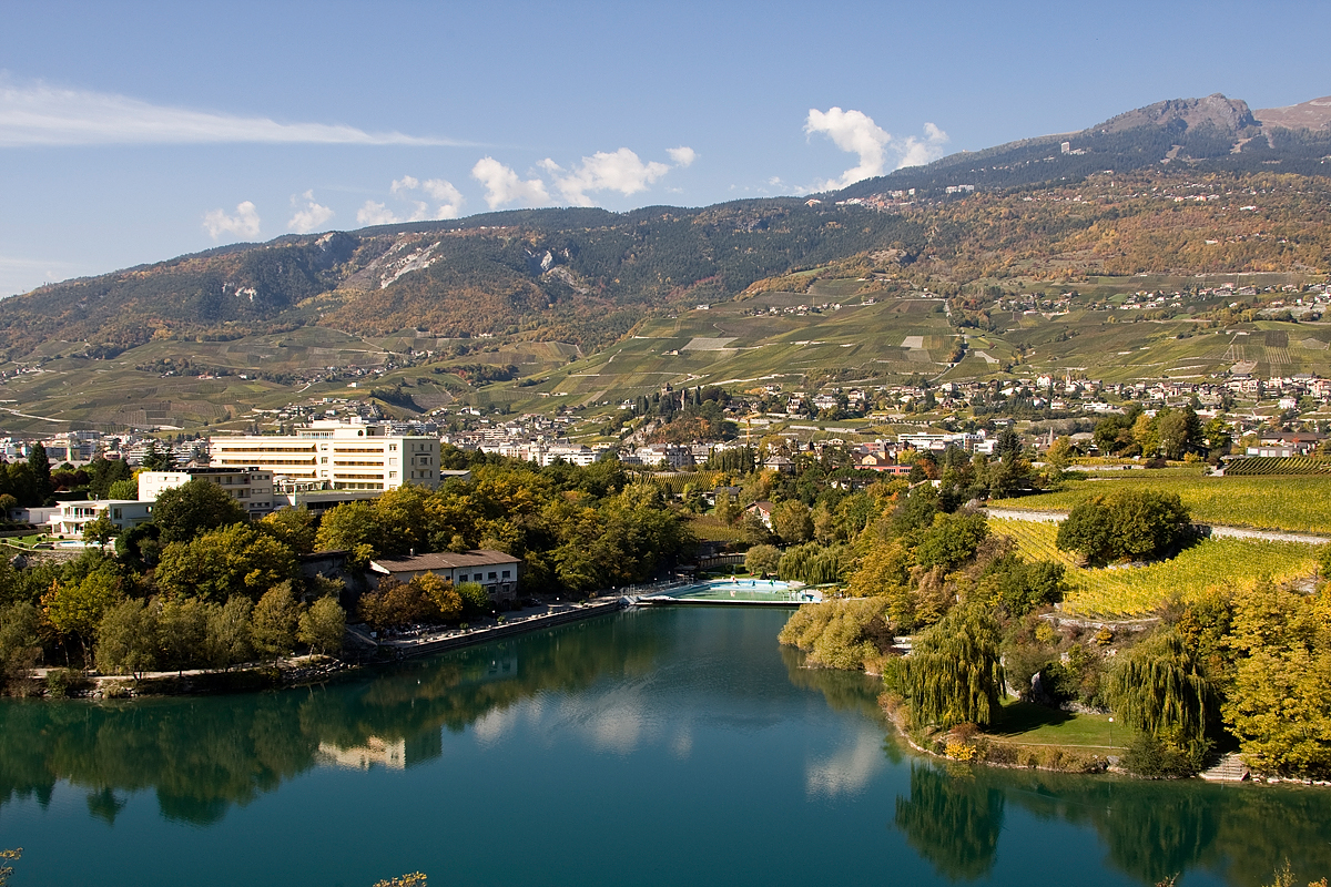 Der Grand-Lac (Lac de Géronde) in Sierre